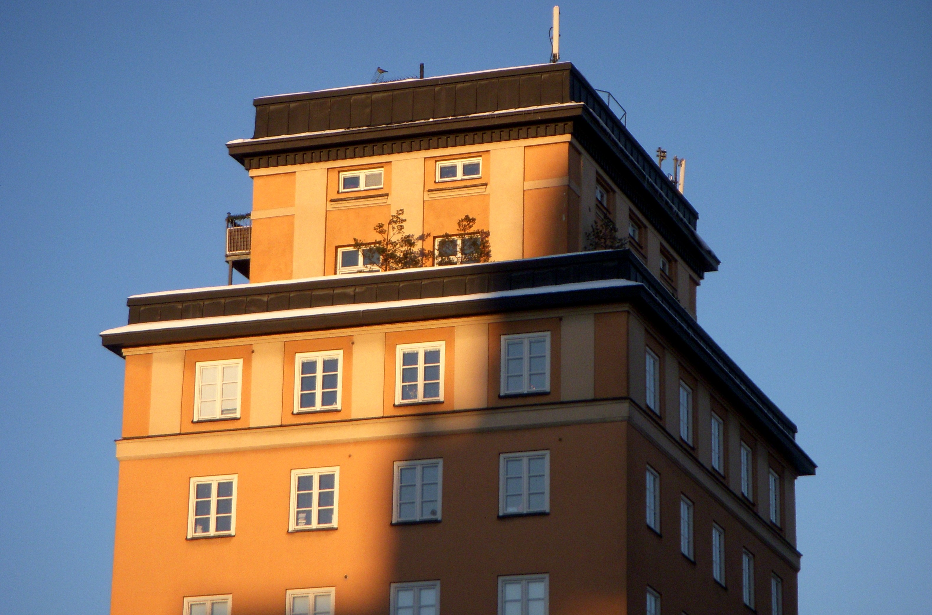 Sankt Eriksgatan 65, Stockholm